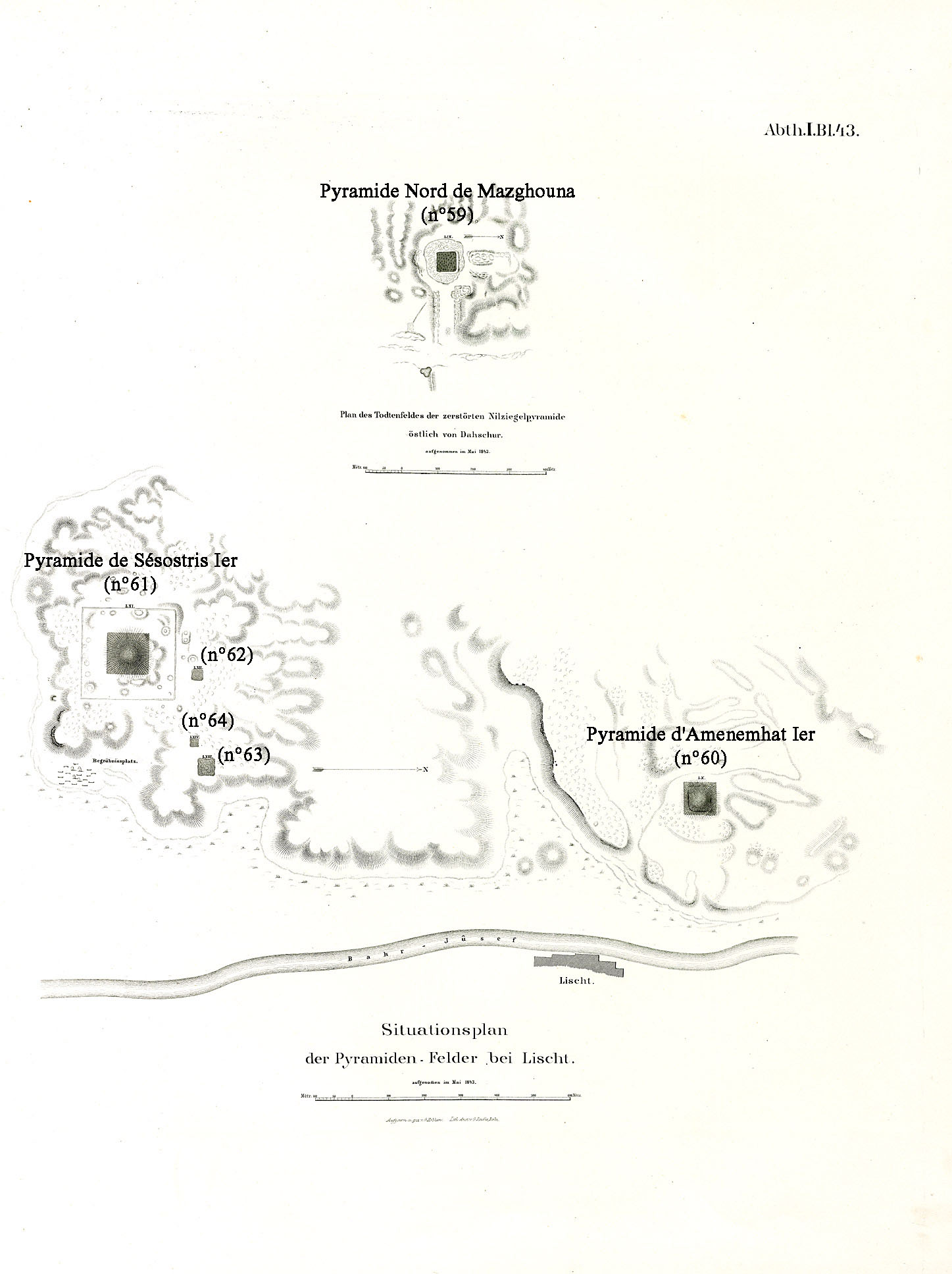 Carte des pyramides de Licht et Dahchour sud selon Lepsius